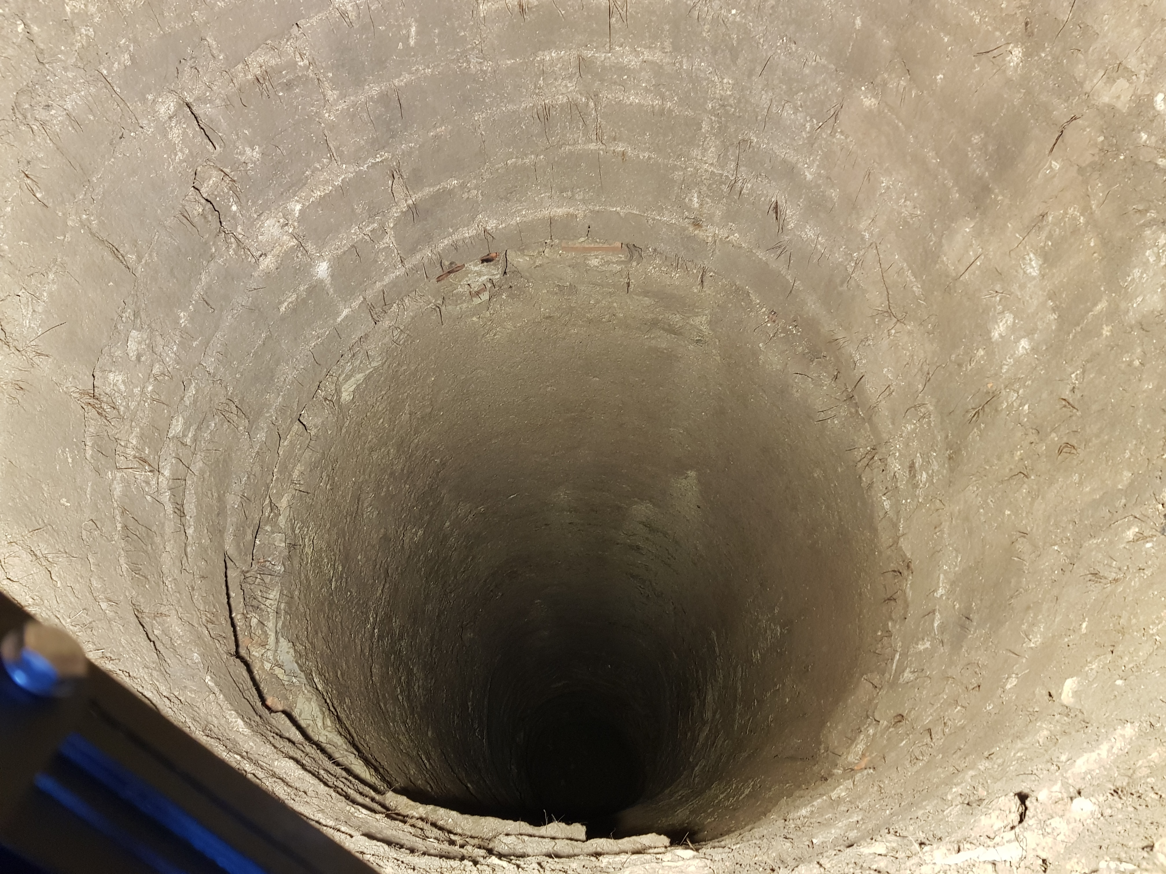 Blick in den Burgbrunnen